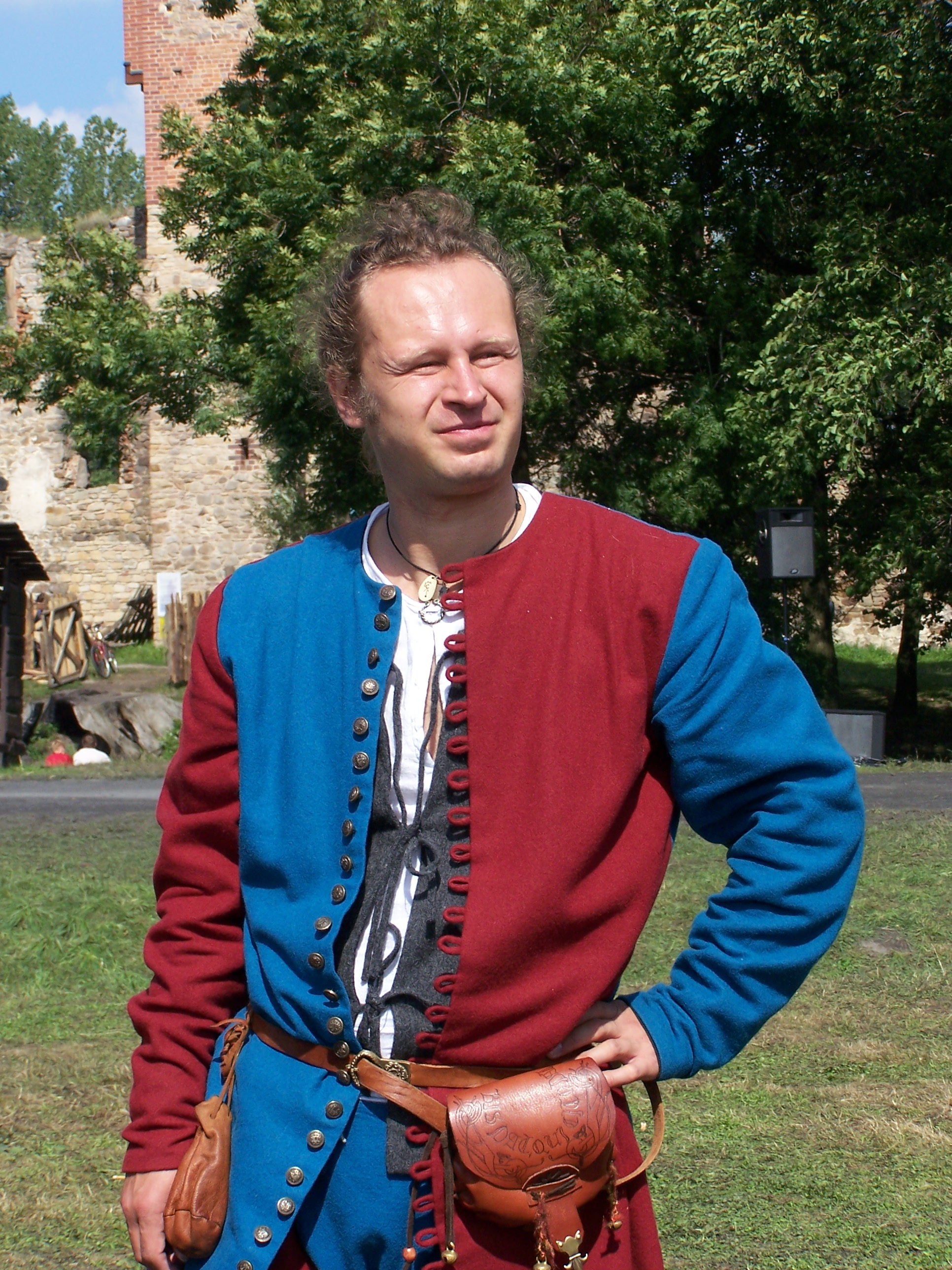 Igor Solovyev z zespołu Drolls wykonującego muzykę dawną podczas VII Jarmarku Średniowiecznego na zamku w Chudowie.